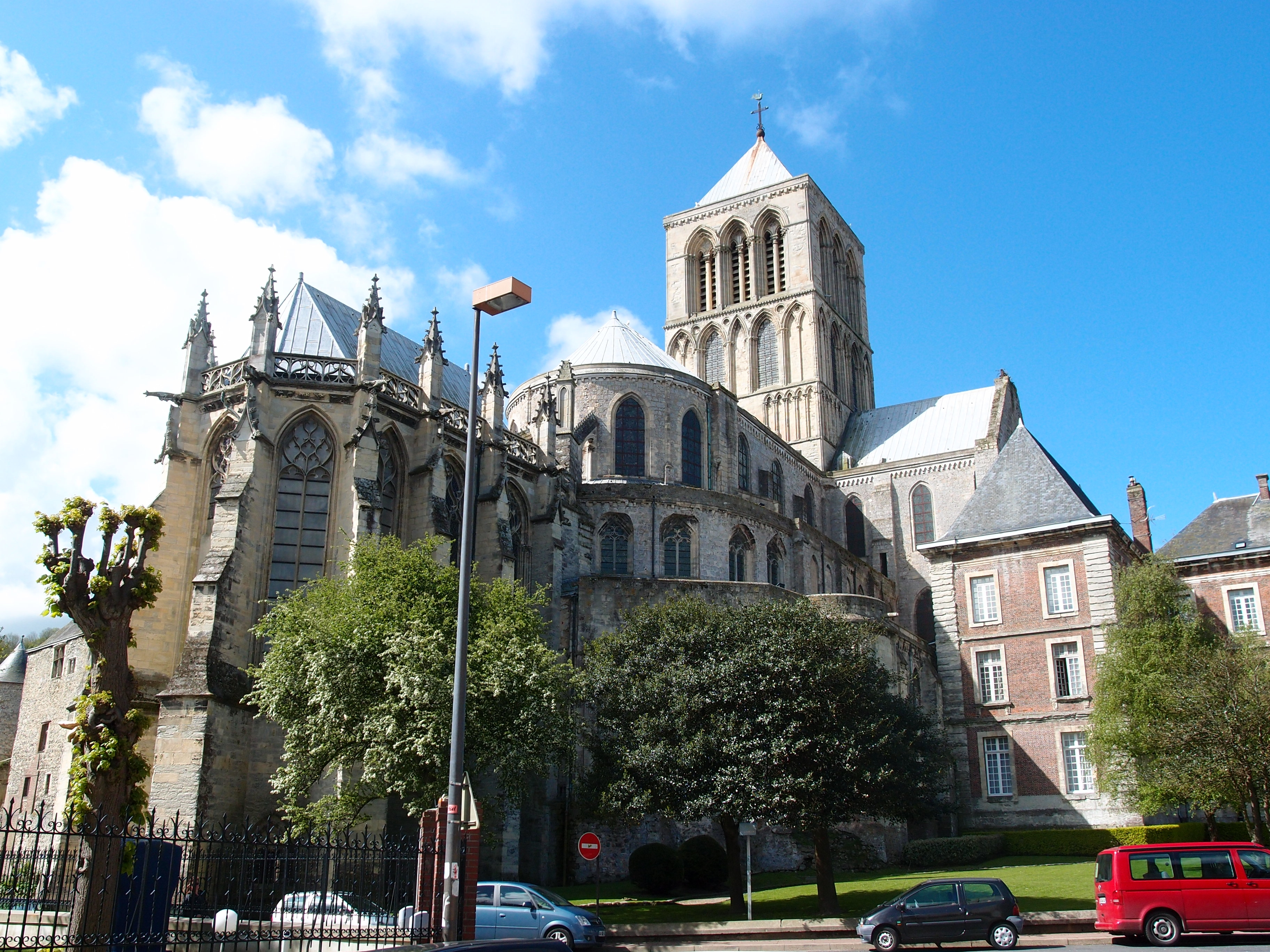 Fécamp: Abtei "La Trinité" Datum: 16.05.2012 Urheber: M. Pfeiffer alias Benutzer:Gordito1869 Quelle: privates Fotoarchiv des Urhebers